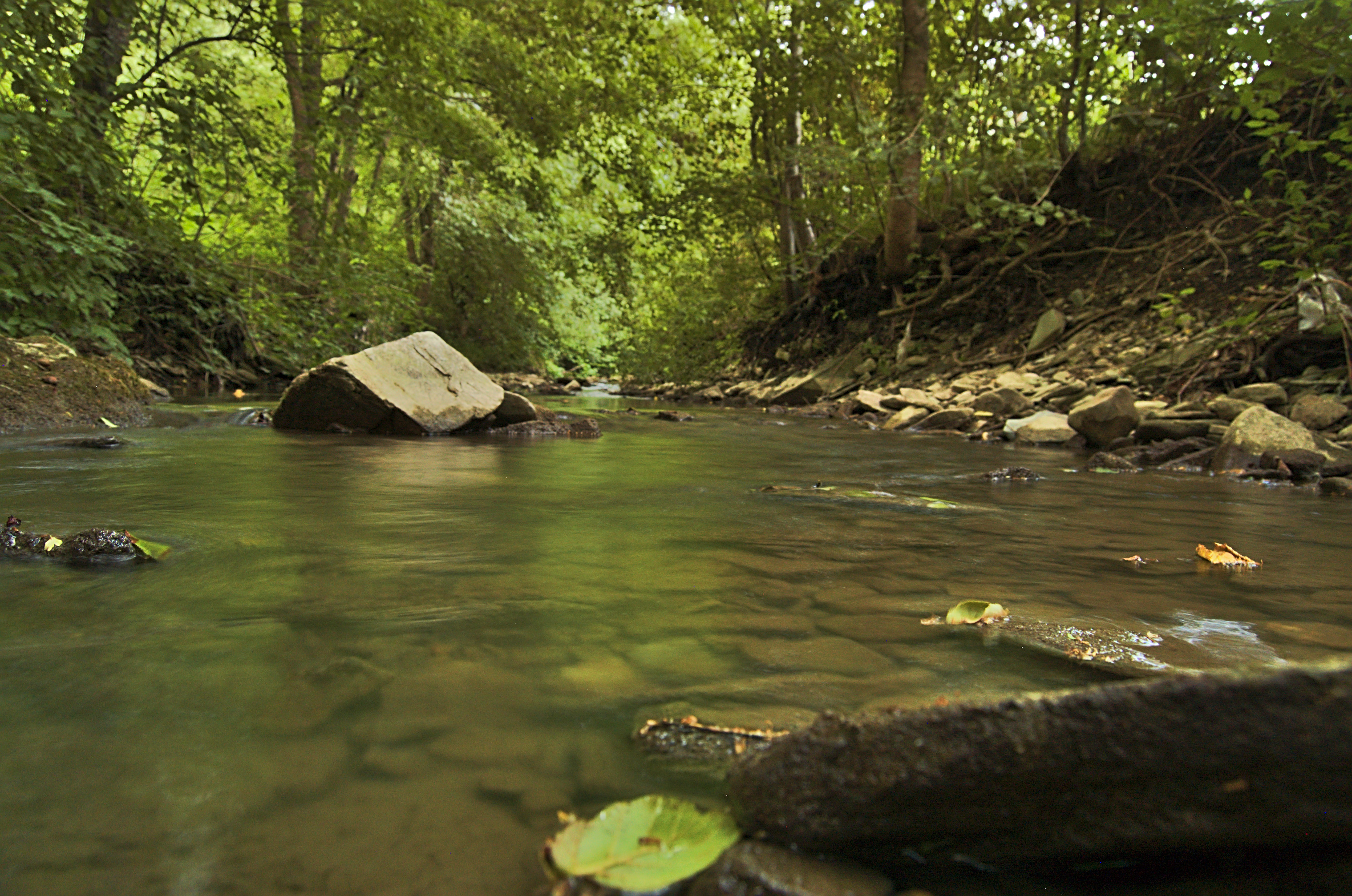 Velička u osady Čerešnické mlýny, Nová Lhota, okres Hodonín